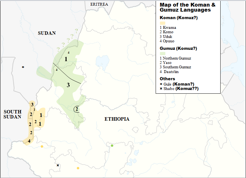 Map of the Koman and Gumuz languages